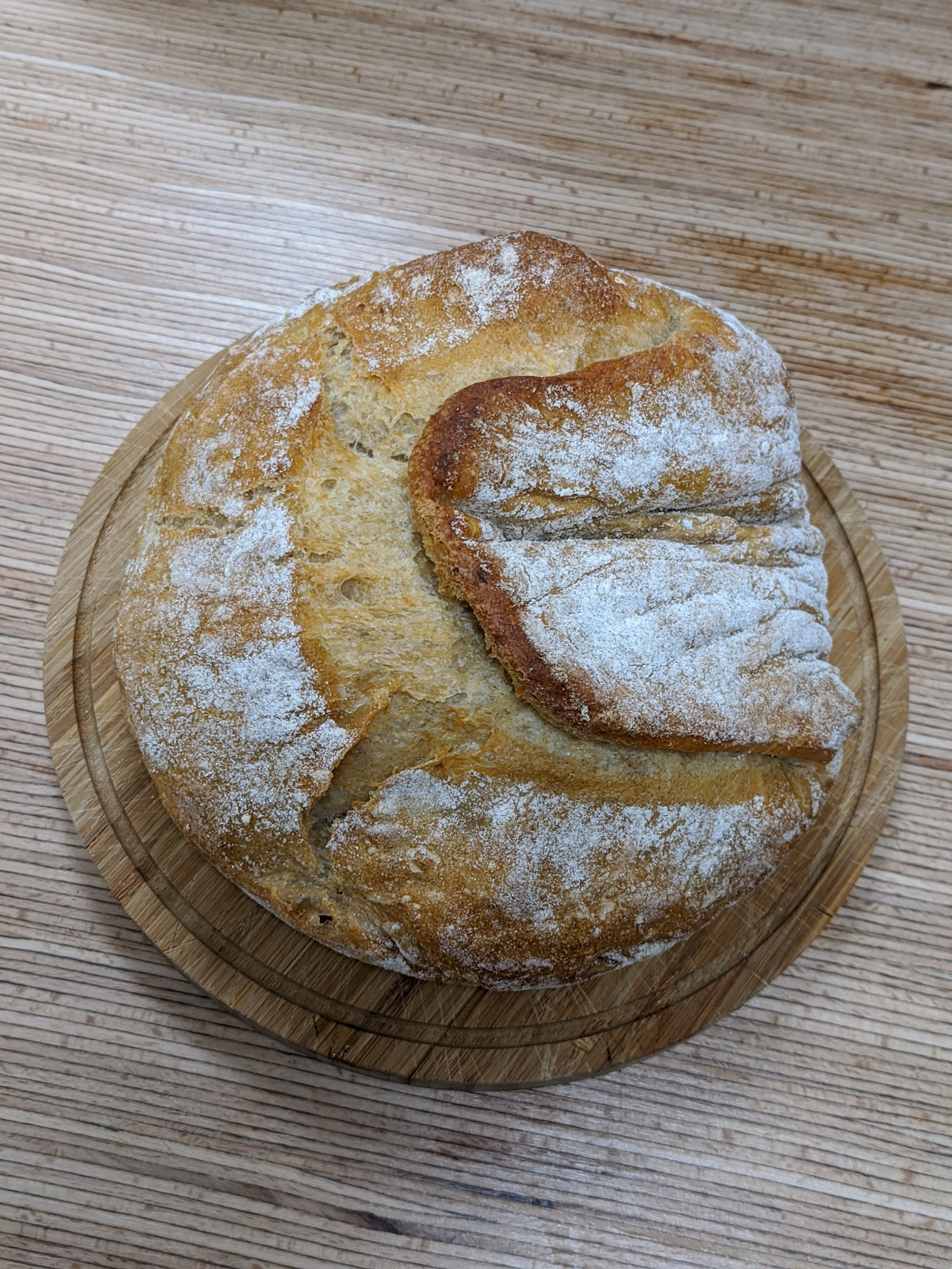 Ein Kartoffelbrot auf einem Tisch